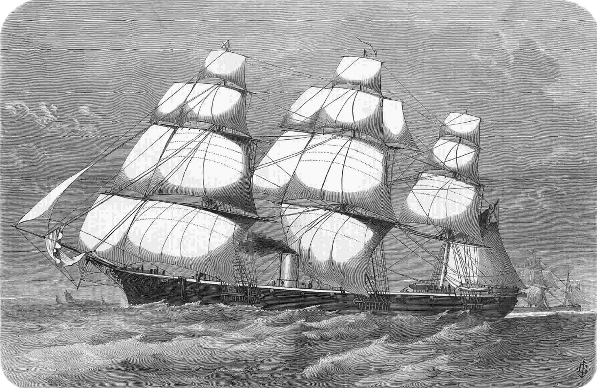 Путешествие Е.И.В. Князя Алексея Александровича на север на корвете "Варяг" в 1870 году. Гравюра Л. А. Серилова с рисунка А. К. Беггрова